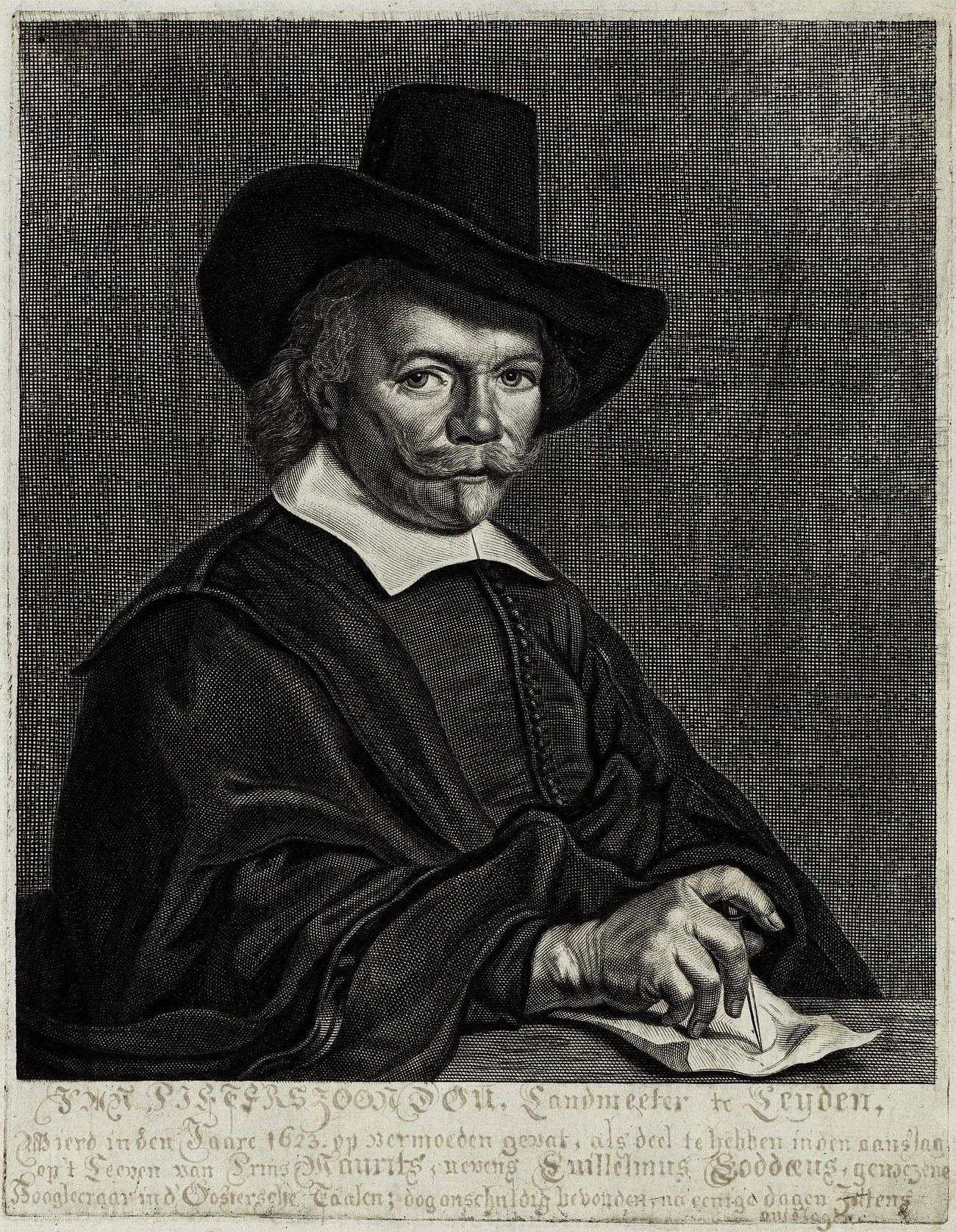 Gravure van Jan Pieterszoon Dou door Reinier van Persijn